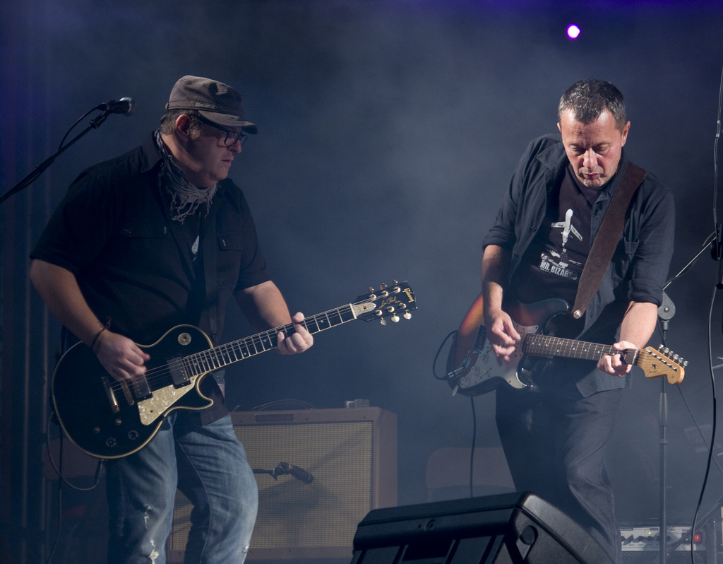 Radiofiera - Villa Cordellina Lombardi, Montecchio Maggiore (VI) - agosto 2010